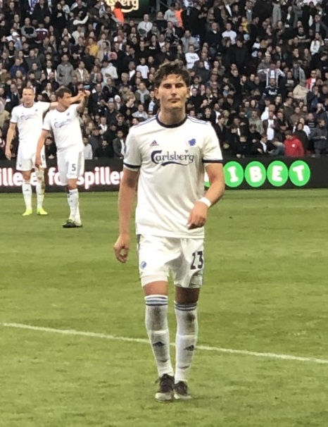 Jonas Older Wind